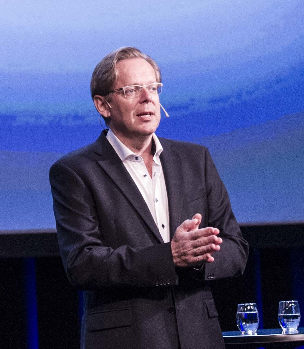 Medvirkende: Mathias Fischer (Bergens Tidende), Bernt Olufsen (Schibsted Media Group), Jette F. Christensen (Ap), Ib Thomsen (FrP), Frank Aarebrot (UiB). Moderator: Arill Riise Foto: Nordiske Mediedager